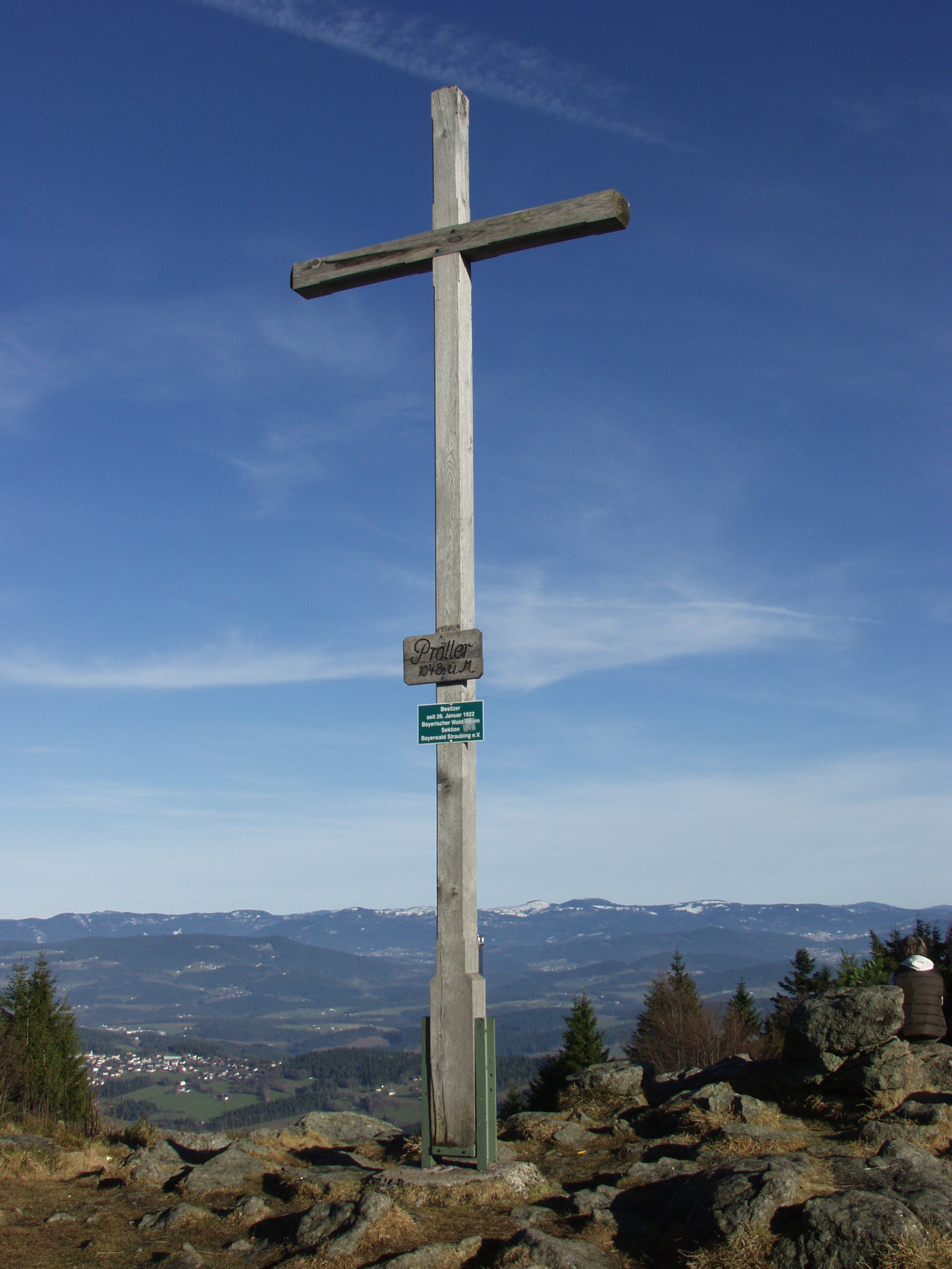 Gipfelkreuz auf dem Pröller